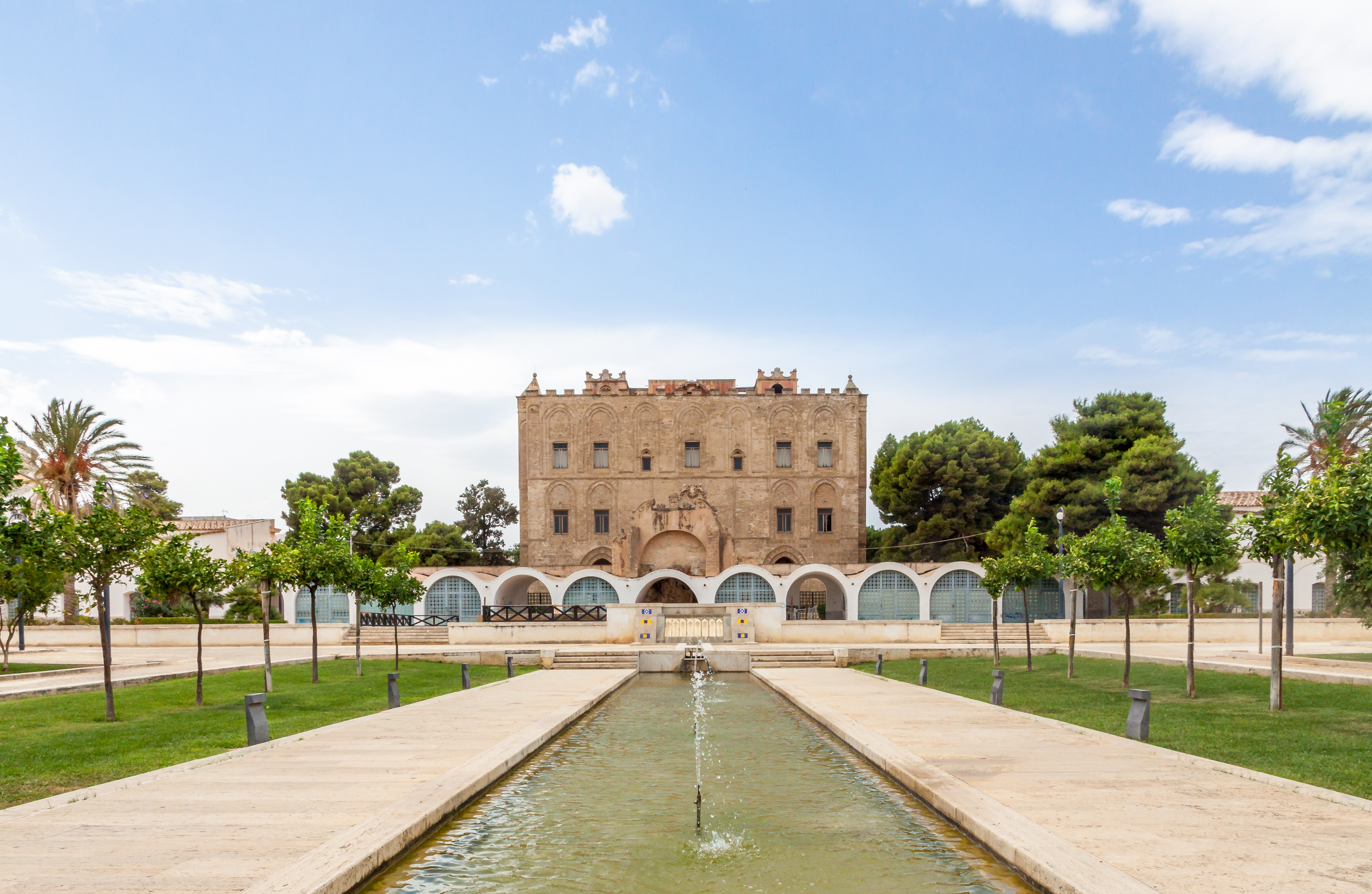 La Zisa